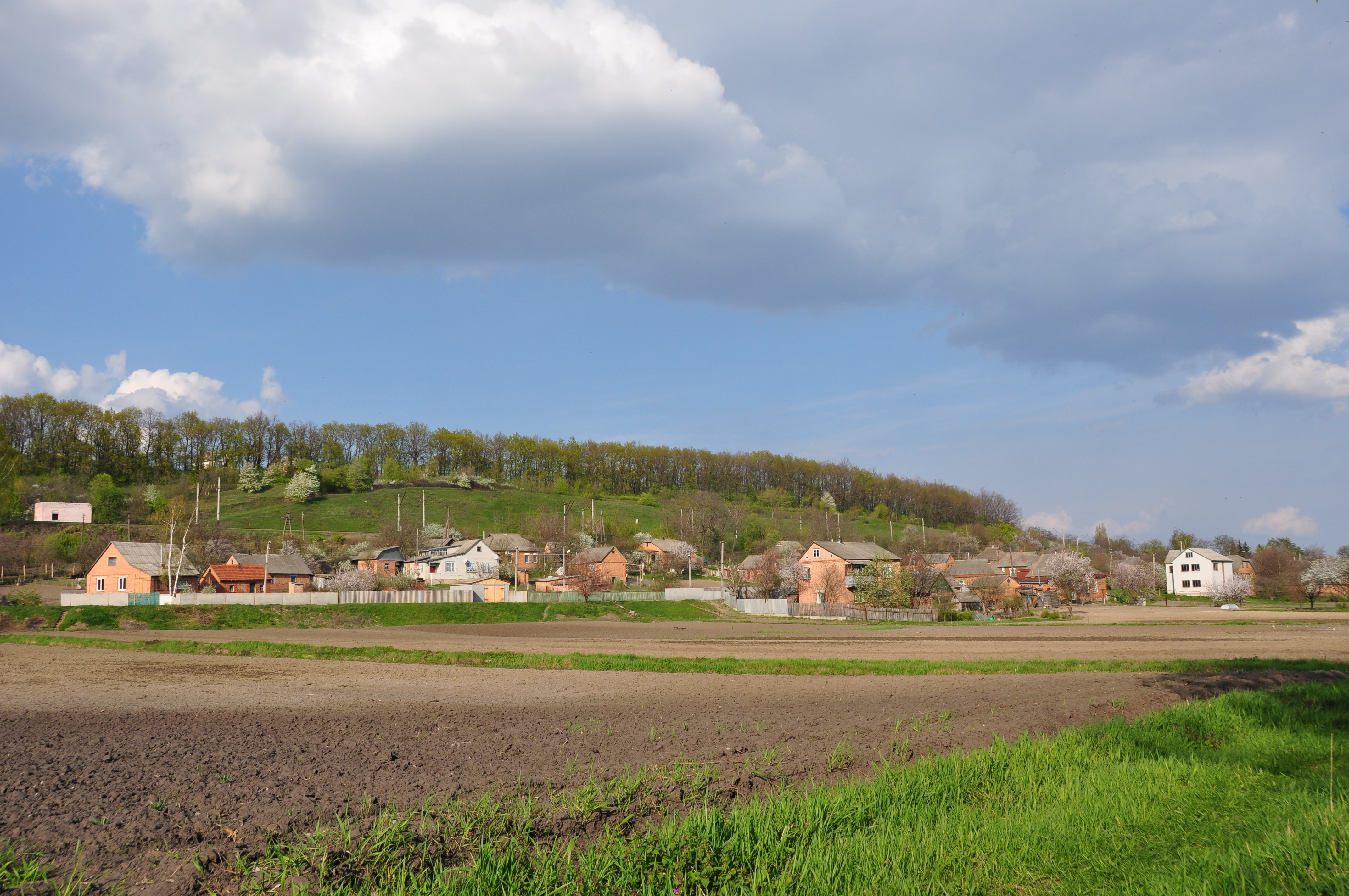 Вид на с. Терни з півдня